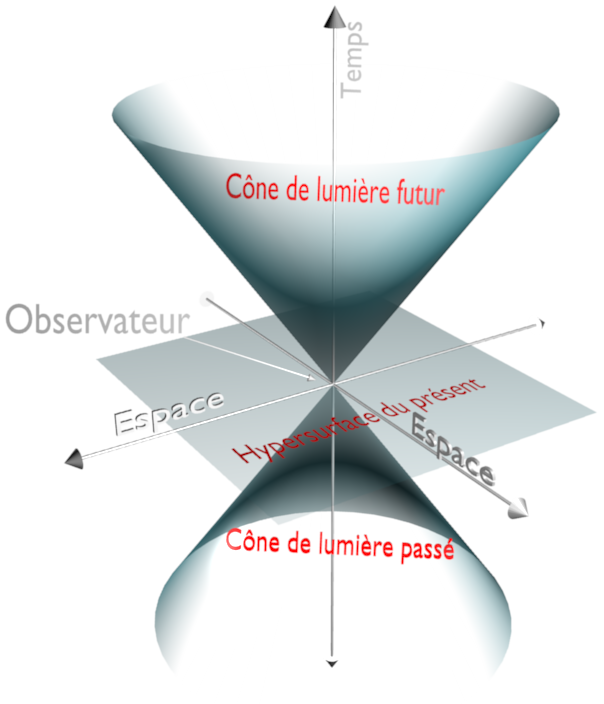 Cône de lumière (Image créée avec Blender)